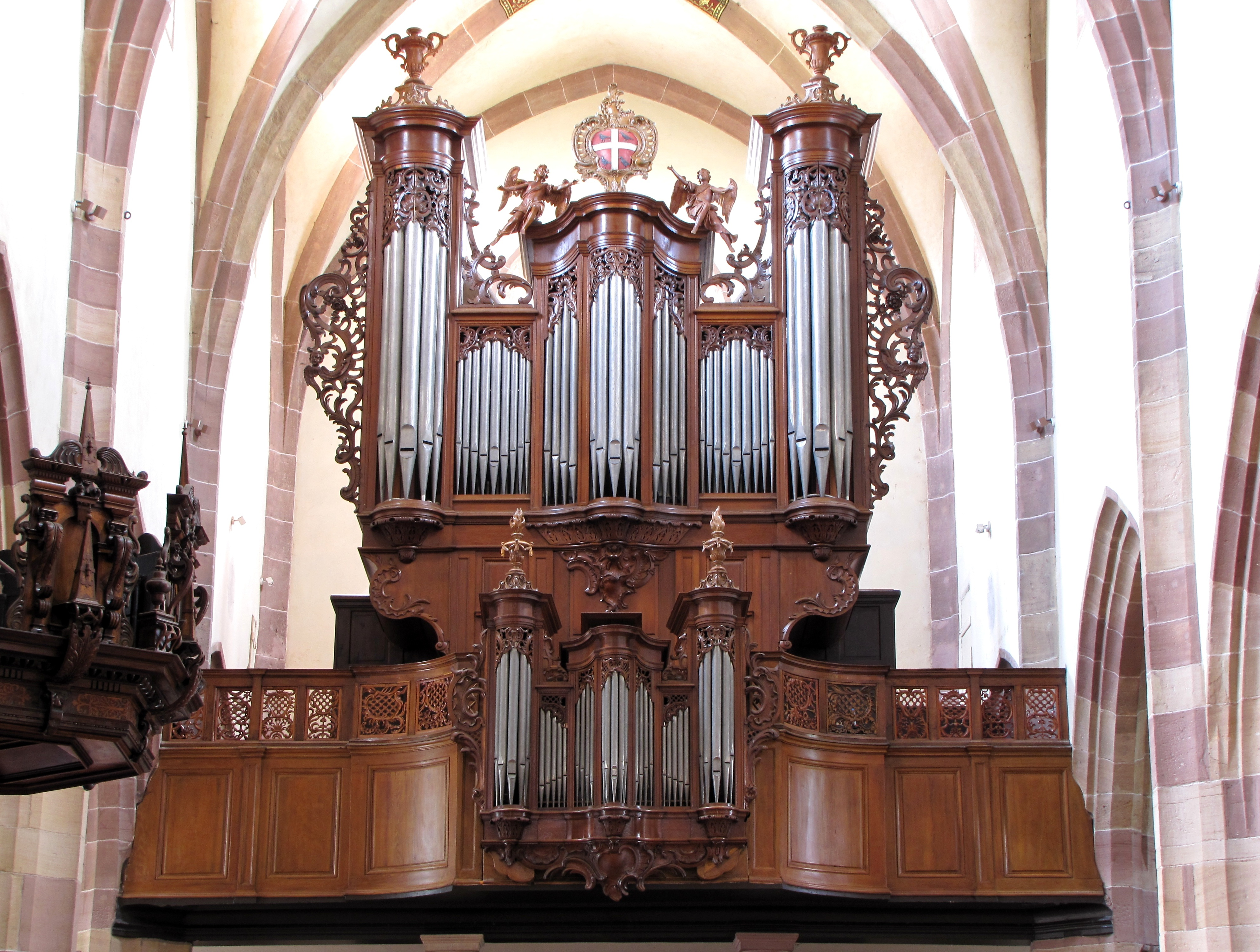 Alsace, Église Saint-Maurice de Soultz-Haut-Rhin (PA00085681, IA00111946).Orgue Jean André Silbermann-Jean Daniel Silbermann (1750): This object is classé Monument Historique in the base Palissy, database of the French furniture patrimony of the French ministry of culture, under the references PM68000943 and IM68004161. This object is classé Monument Historique in the base Palissy, database of the French furniture patrimony of the French ministry of culture, under the references buffet PM68000348 buffet and instrument PM68000517 instrument.